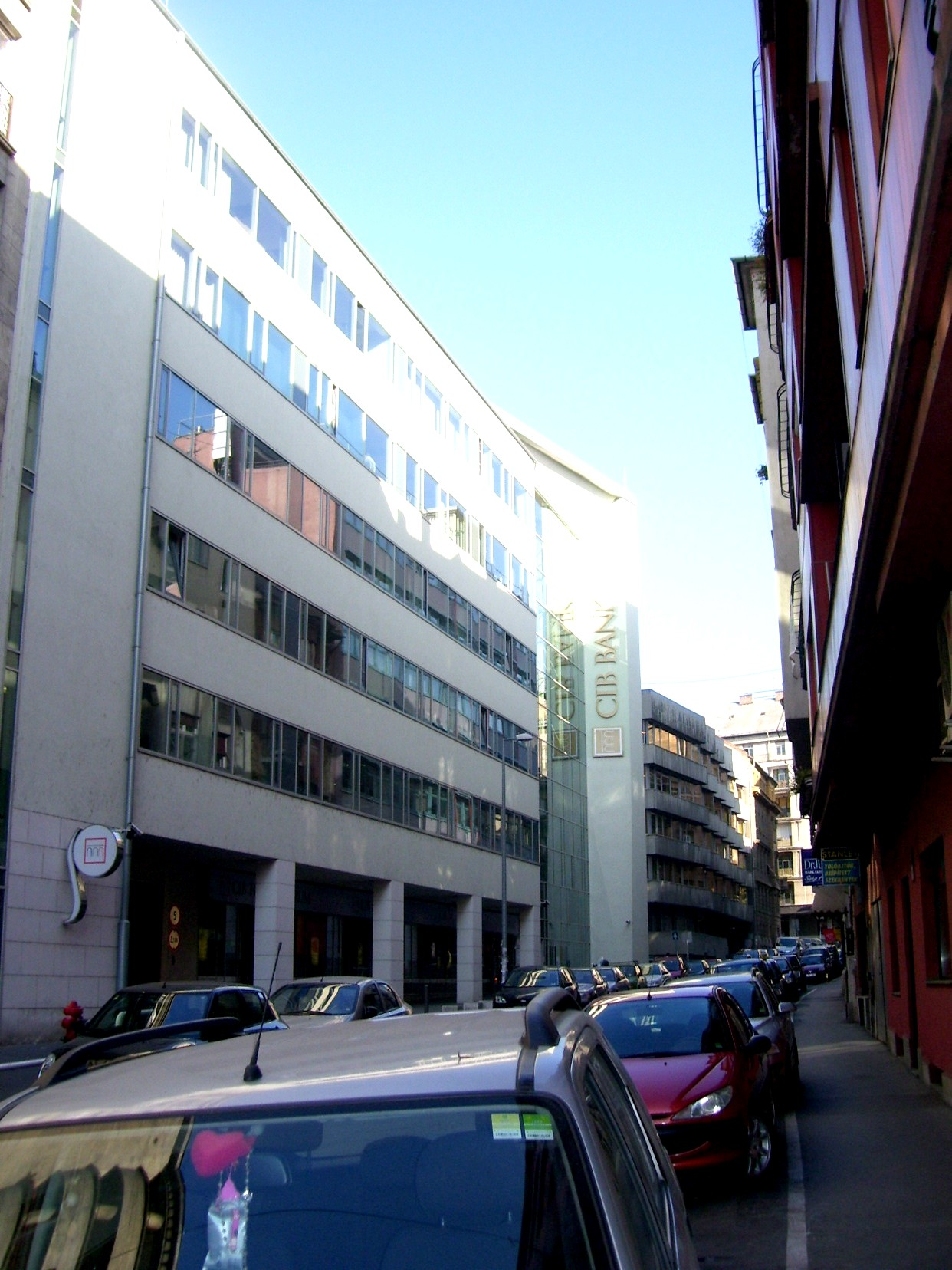 A CIB Bank székháza Budapest II. kerületében